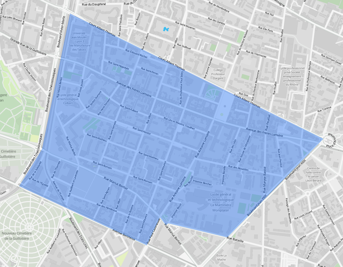 Quartier de Monplaisir en bleu, sur une carte OpenStreetMap exportée avec uMap (fond OSM Hydda). Carte © les contributeurs d’OpenStreetMap.